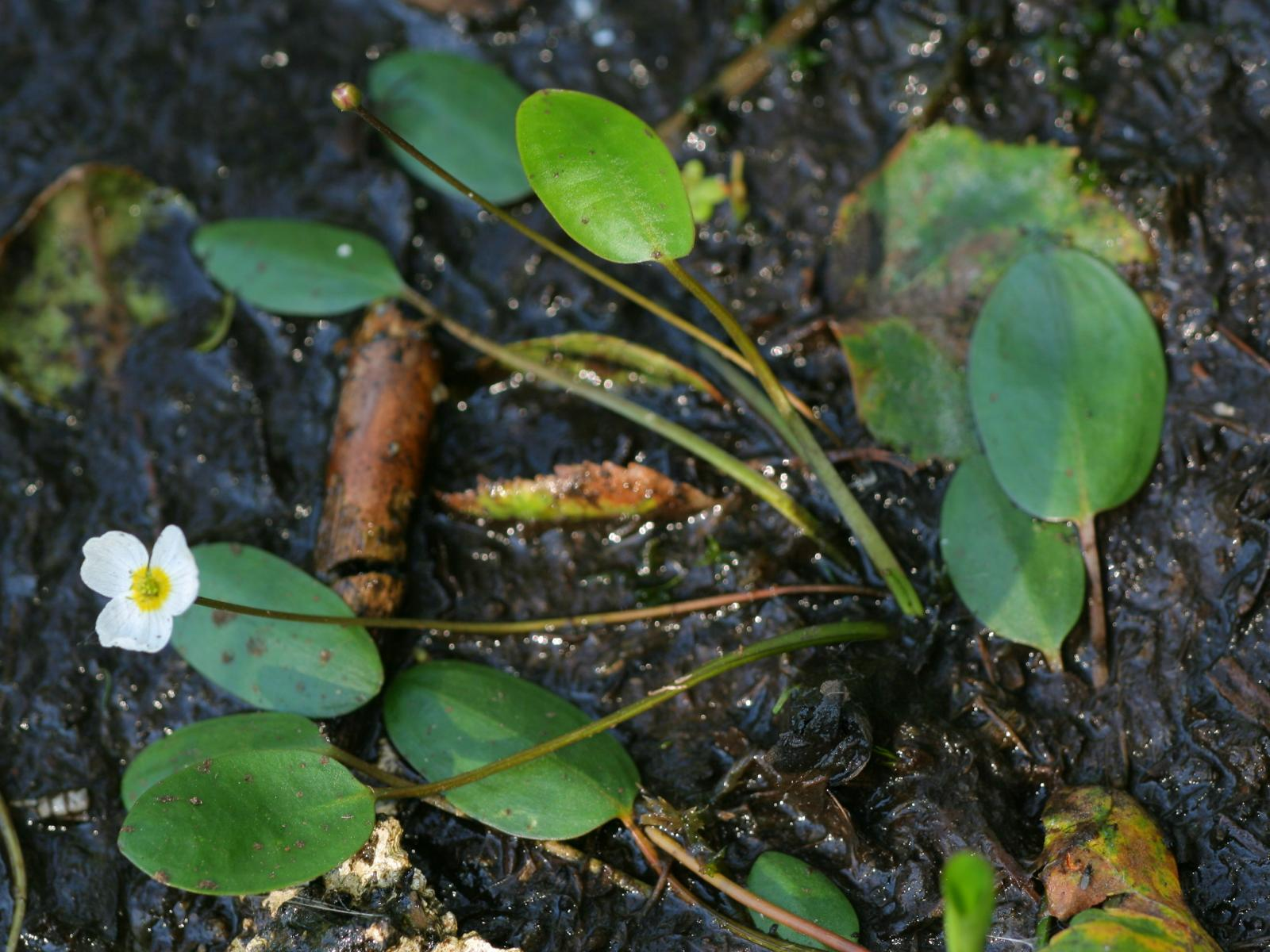 Schwimmendes Froschkraut (Luronium natans)